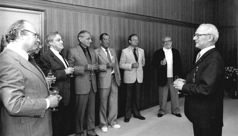 ADN-ZB 25.8.82 Berlin: Honecker-Geburtstag Eine Abordnung von Kunst- und Kulturschaffenden übermittelte die herzlichsten Grüße und Wünsche. Von links nach rechts: Lothar Bellag, Heinz Kamnitzer, Manfred Wekwerth, Willi Sitte, Hermann Kant und Wolfgang Heinz. (schm)